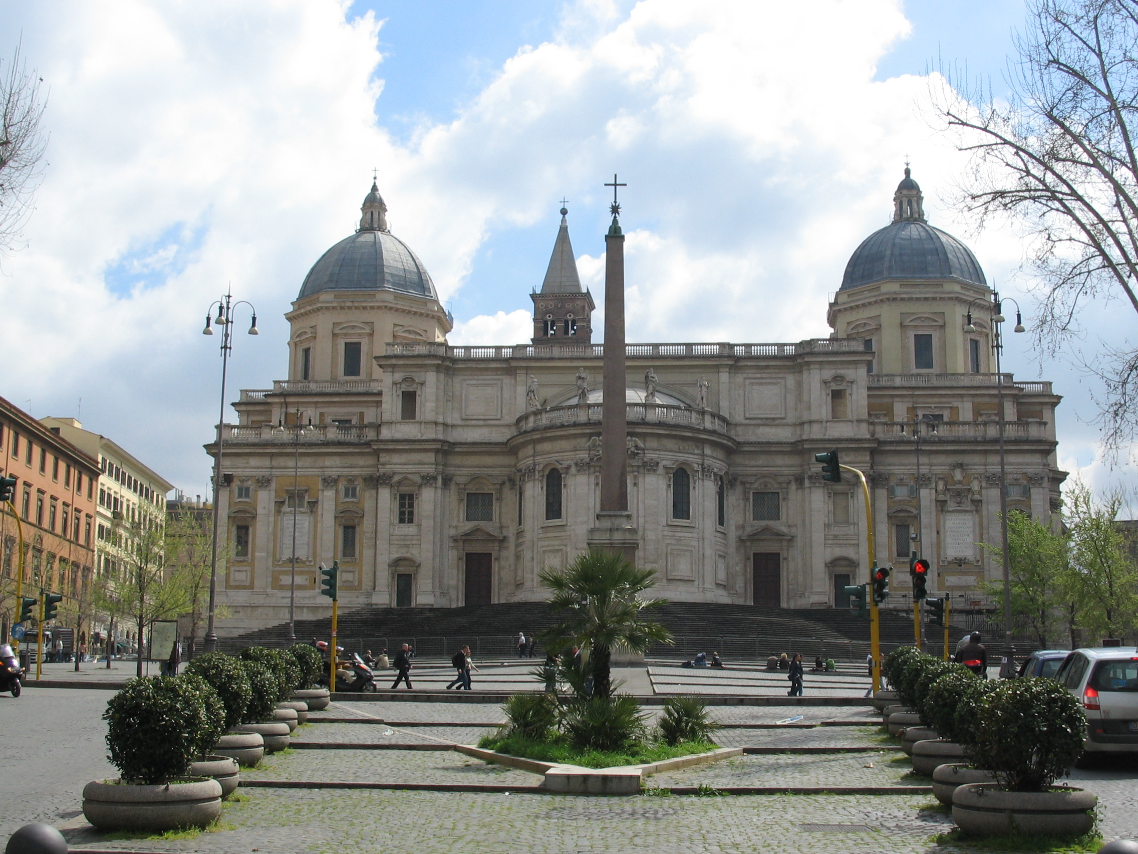 Piazza Esquilino with Basilica di Santa Maria Maggiore, Rome, Italy.